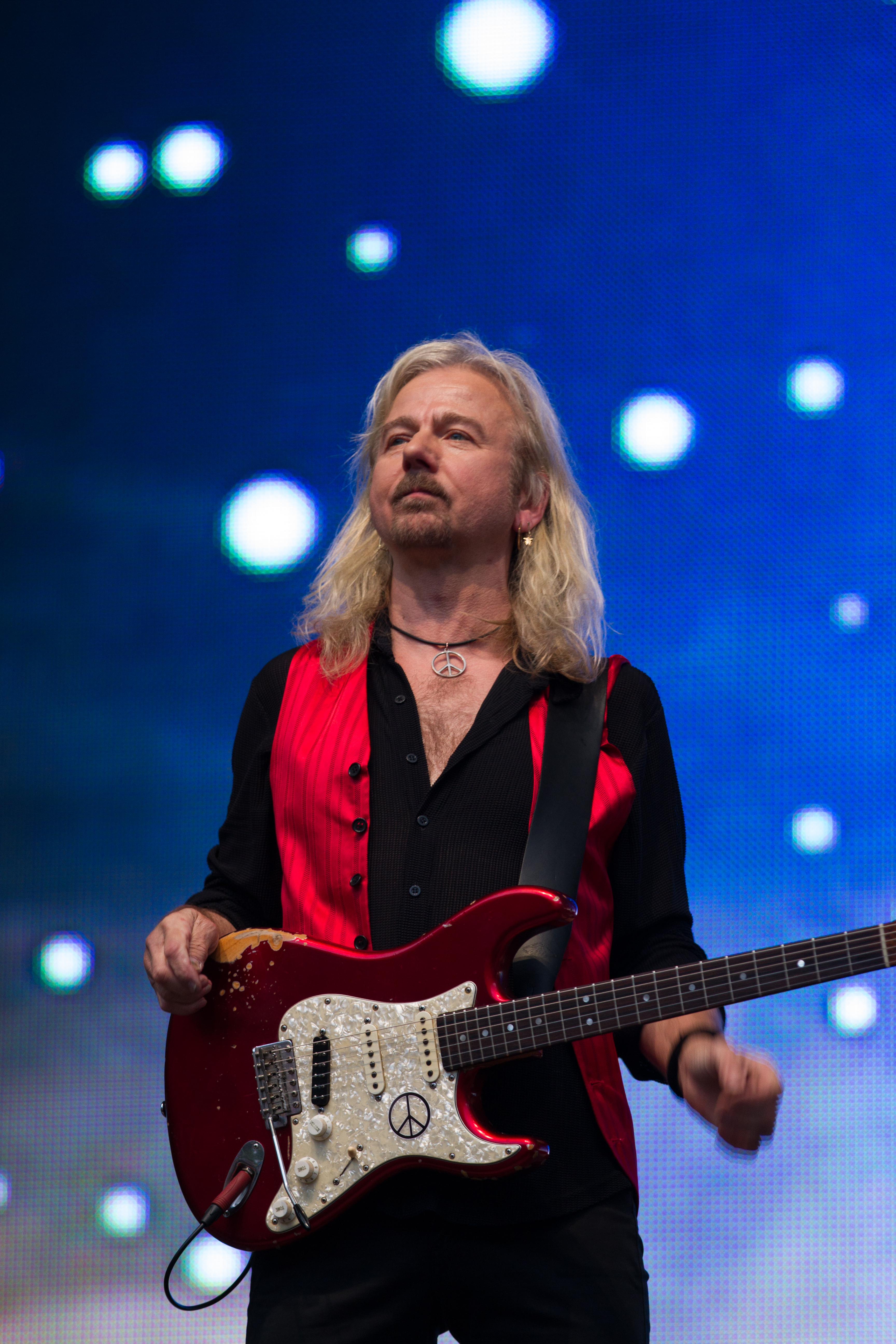 Bernd Römer beim "Karat 40 Jahre KARAT - Das EINZIGE Jubiläumskonzert" in der Berliner Waldbühne am 20.06.2015